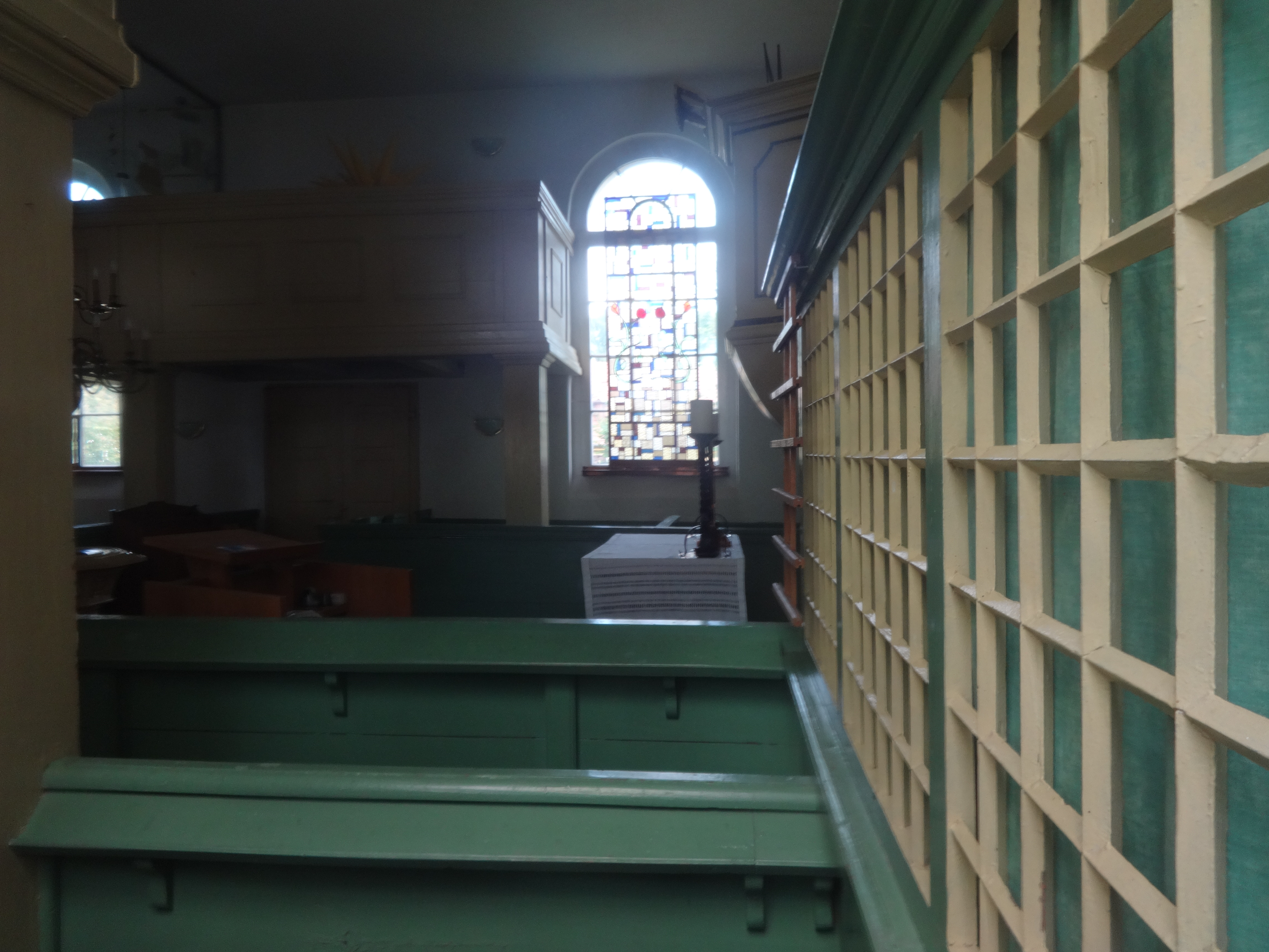 Die Dorfkirche in Seddin, Gemeinde Seddiner See im Landkreis Potsdam-Mittelmark, ist eine Saalkirche aus dem Jahr 1735. Im Innern stehen unter anderem ein polygonaler Kanzelaltar sowie eine Hufeisenempore.